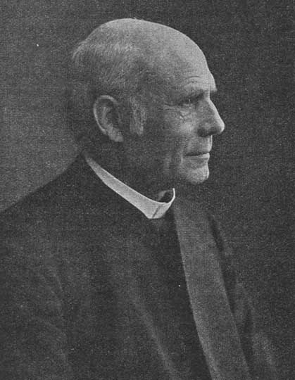 Theodor Weber, deutscher alt-katholischer Bischof 1895-1906